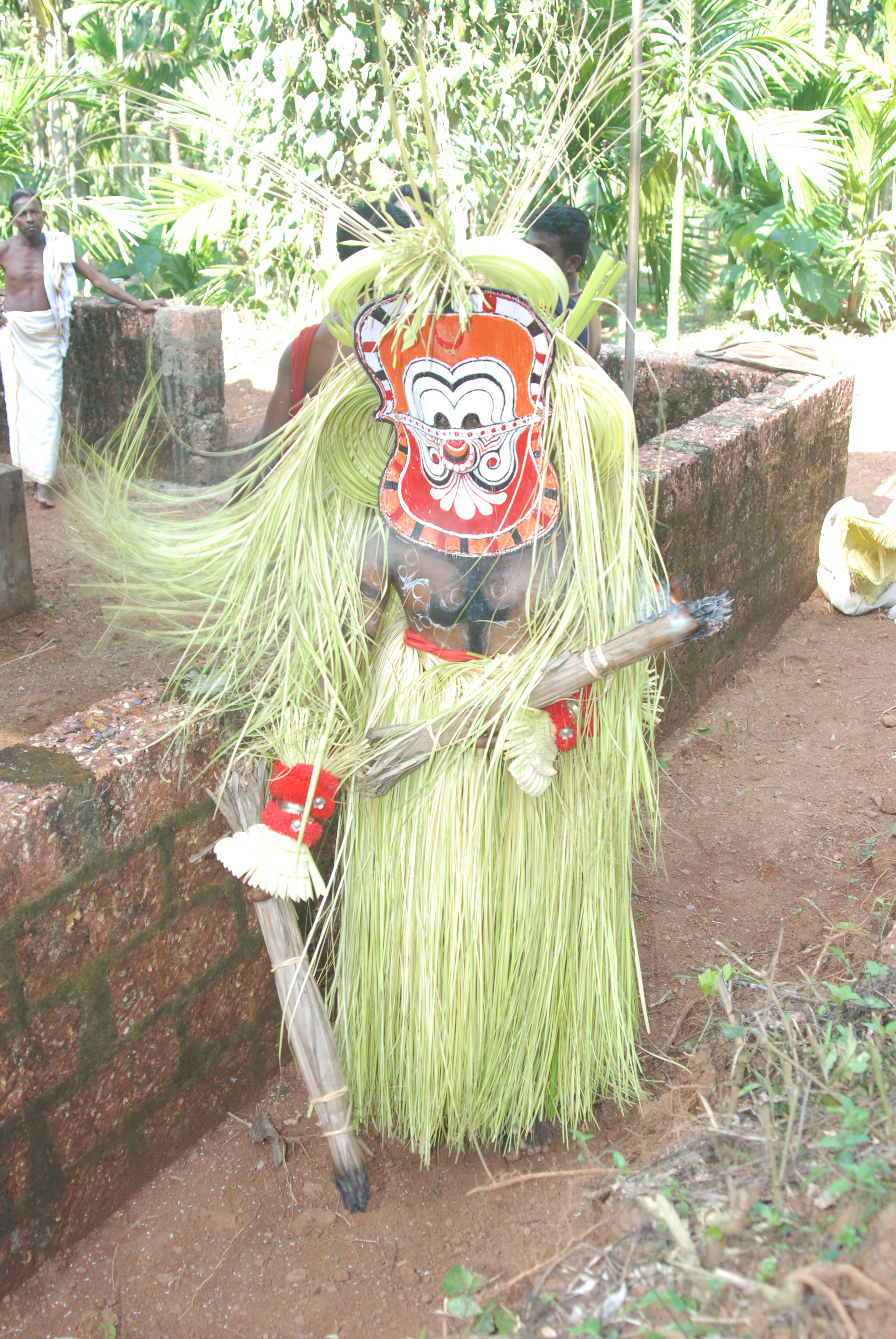 പൊട്ടന്‍ തെയ്യത്തിന്റെ പുറപ്പാട്